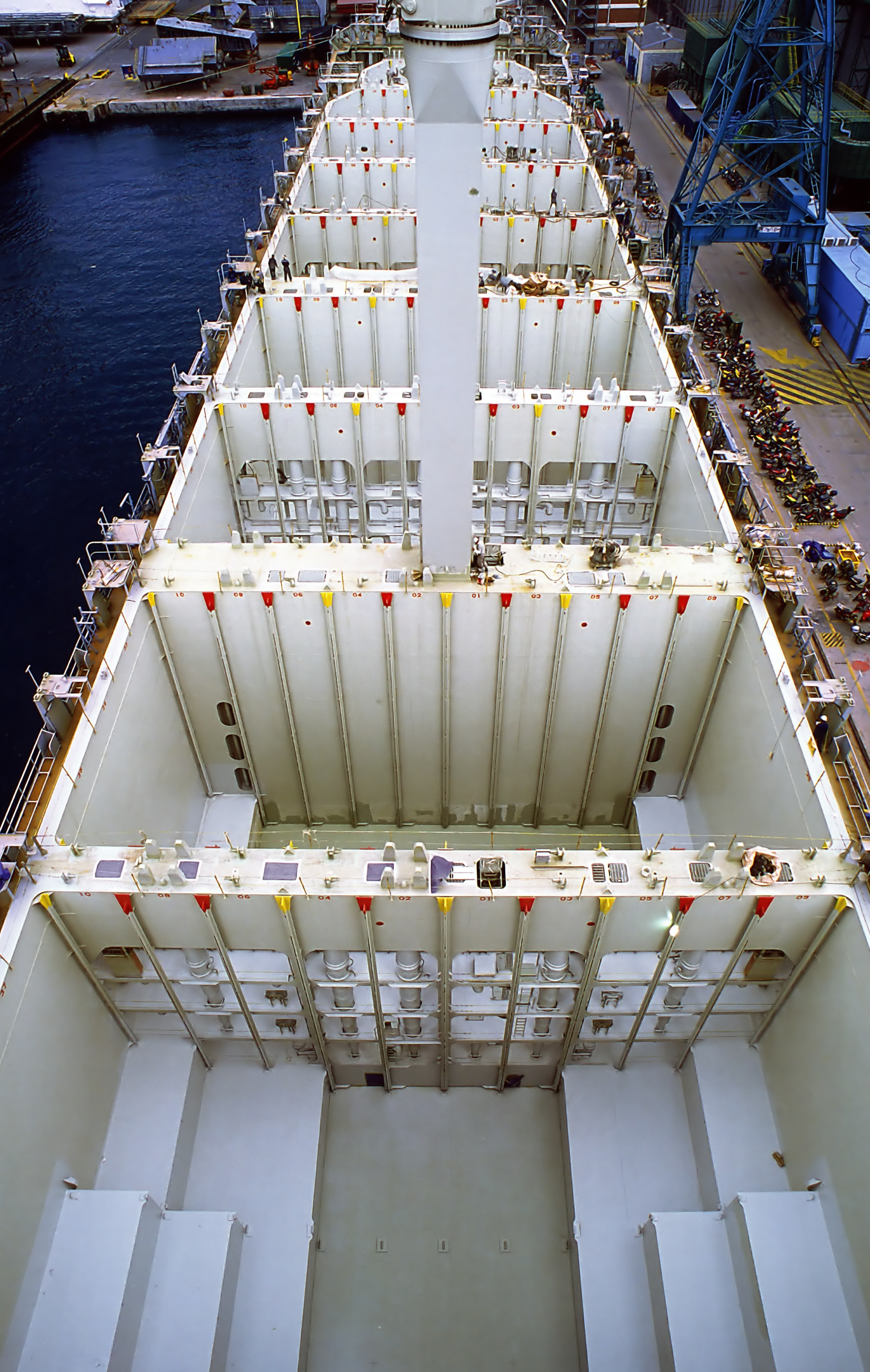 Containerladeräume eines Frachtschiffes. Bearbeitete Version von Image:Containerladeräume_Schiff.jpg durch Smial Original-Beschreibung: (Uploaded by Benutzer:Seebeer) Uploaded with Reworkhelper